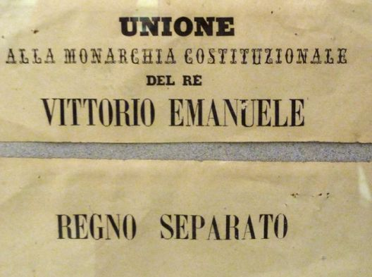 L'11 e 12 marzo in Emilia-Romagna si vota per l'annessione Regno sabaudo. Per la prima volta (e unica nell'Ottocento) possono andare alle urne tutti i cittadini maschi (suffragio universale maschile). A Bologna circa 16.000 persone vanno festose alle urne, portando coccarde tricolori appuntate sul cappello. Gli studenti e gli artigiani sfilano in gruppo dietro le proprie insegne, al suono delle campane e delle bande cittadine. Il risultato del Plebiscito è, in ambito regionale, di 426.006 voti a favore, 756 contro e 750 voti nulli. Nella provincia di Bologna, su 76.500 votanti, 76.276 sono favorevoli all'annessione e solo 63 votano per il Regno separato.